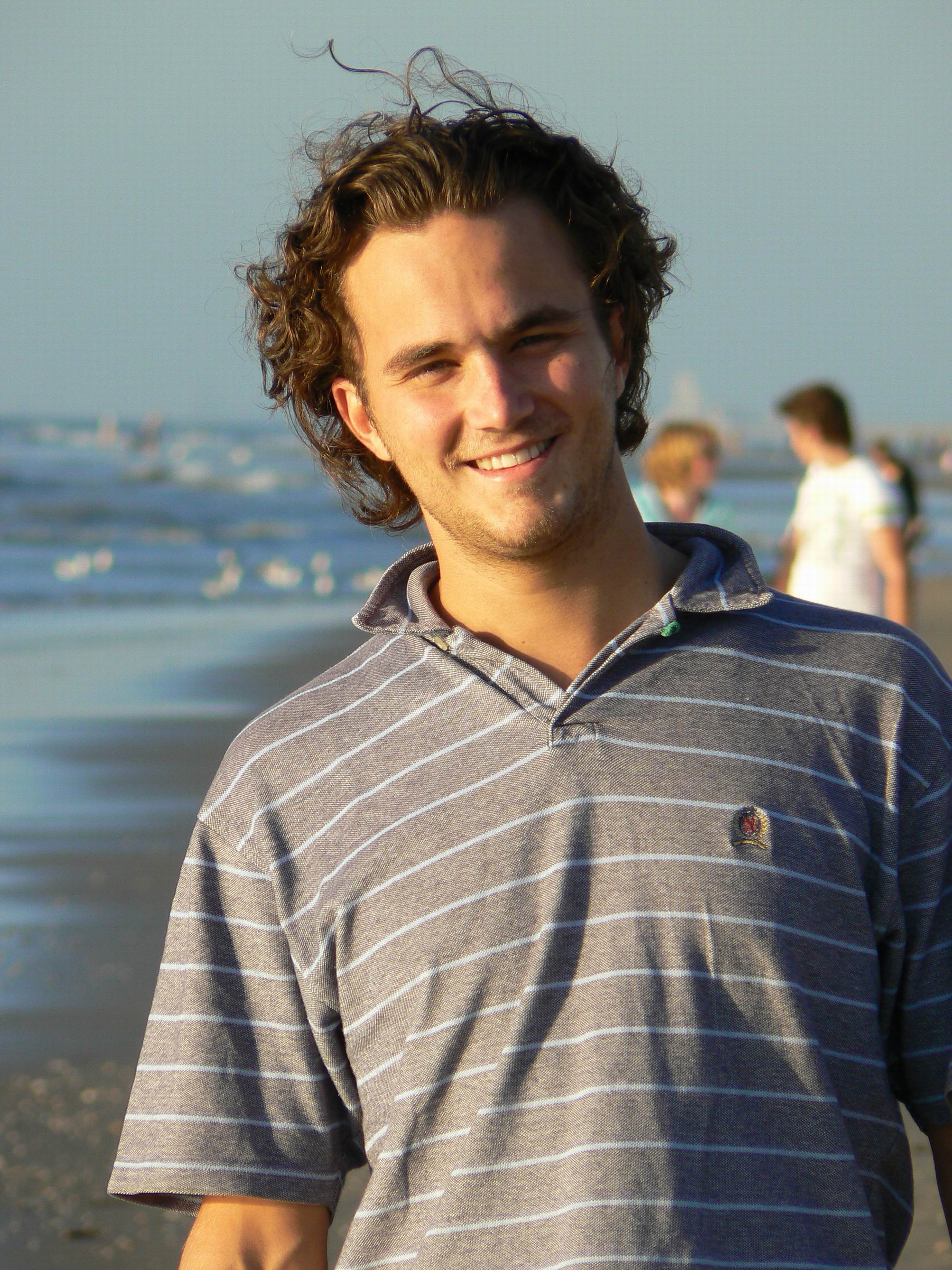 portret van acteur Joris Putman foto Kees Putman sept. 2006 (eigen werk)